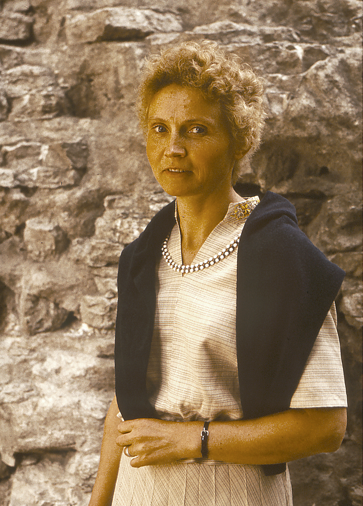 Helme Suuk